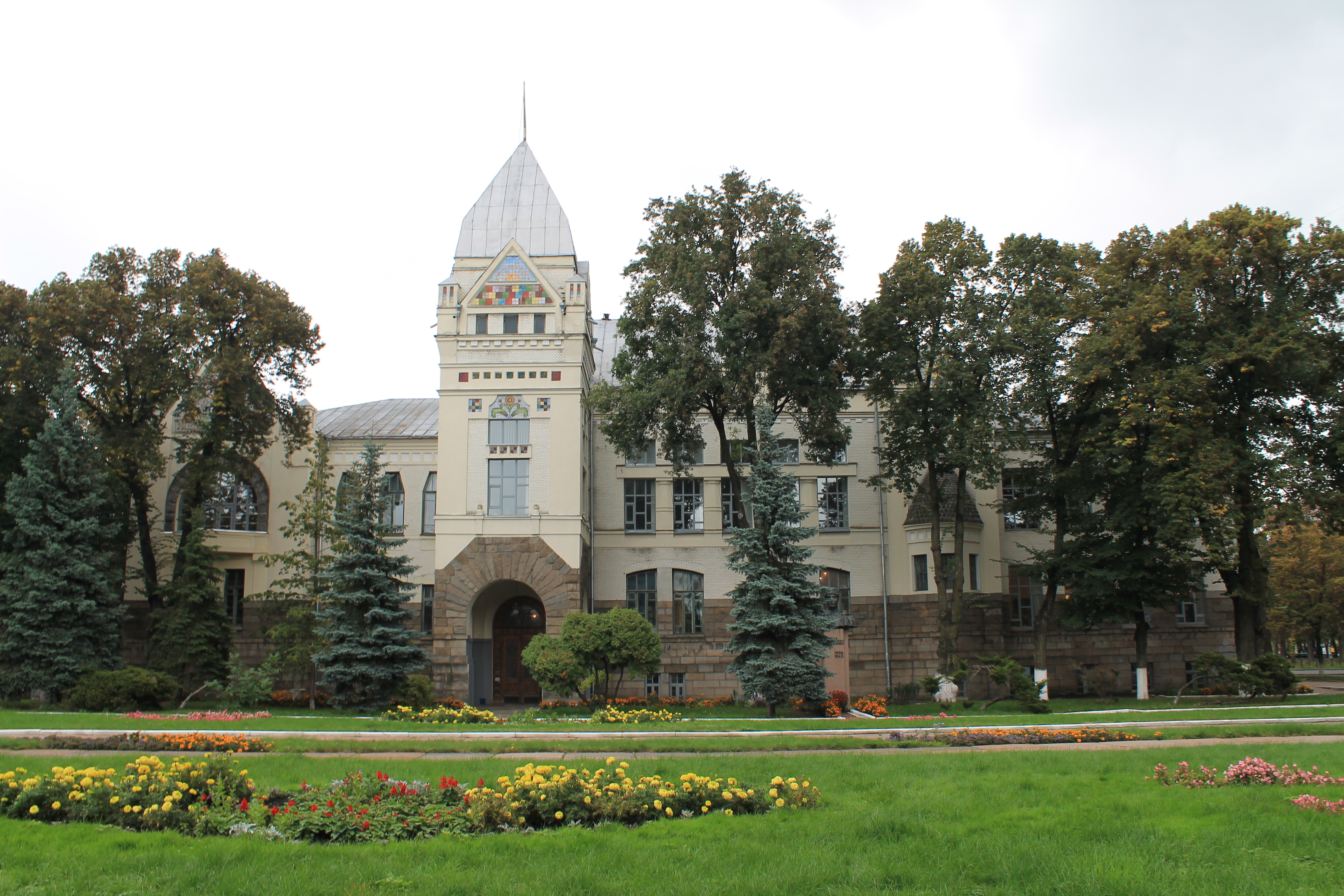 Будинок дворянського і селянського поземельного банку (мур.), Чернігів, пр-т. Миру, 41